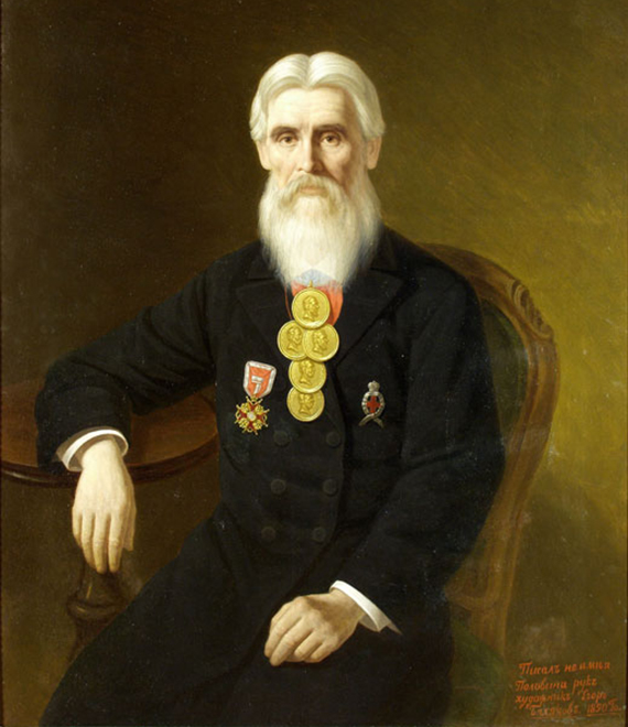 Портрет Тимофея Емельяновича Колесникова, 1890 год